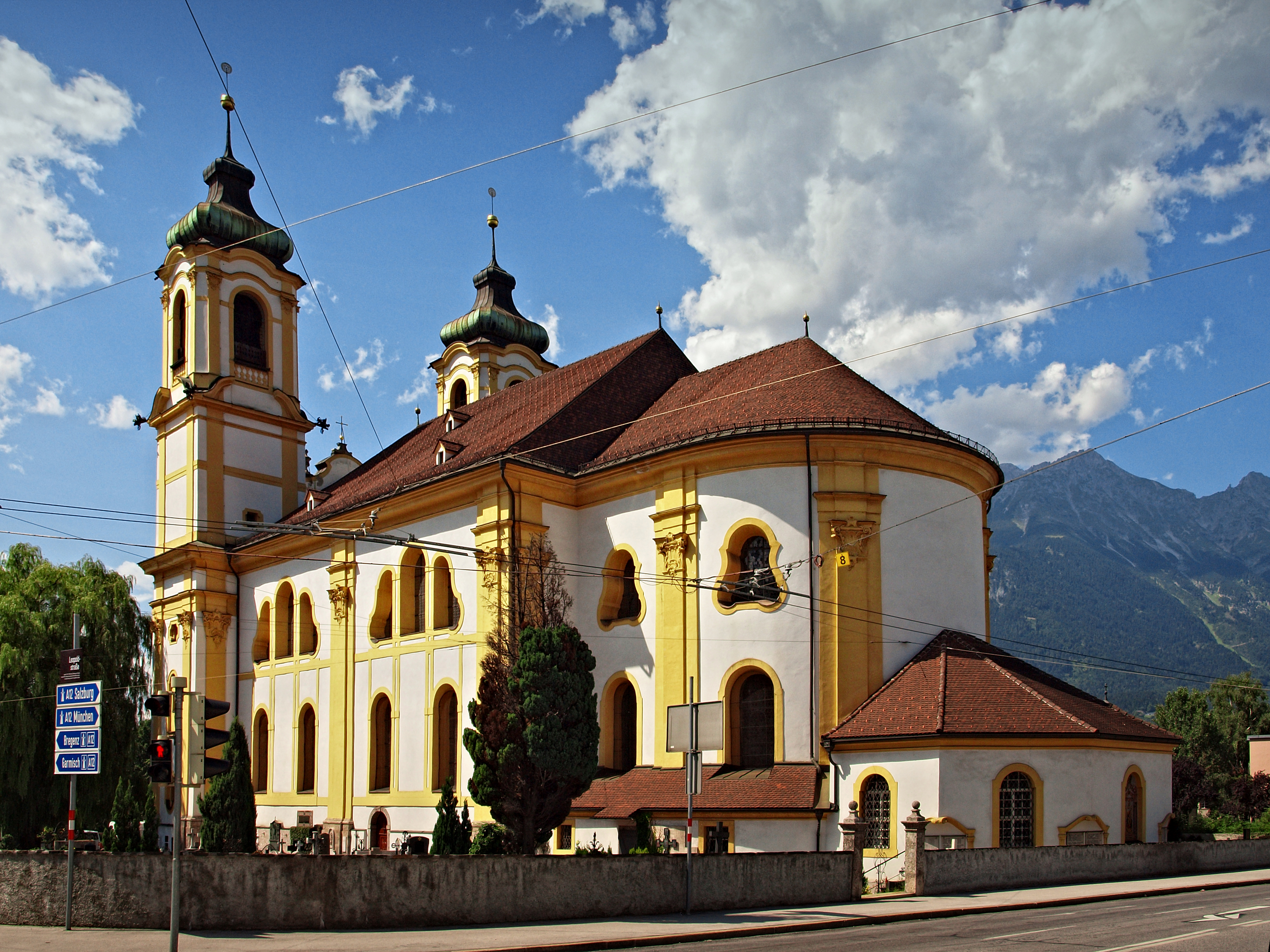 Innsbruck (Autriche) - Notre-Dame des 4 Colonnes (Basilique de Wilten)